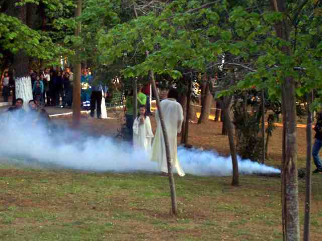 Desciption: Passione di Cristo (Lizzano (TA)) Photographer: --Asia Date: 9.4.2006